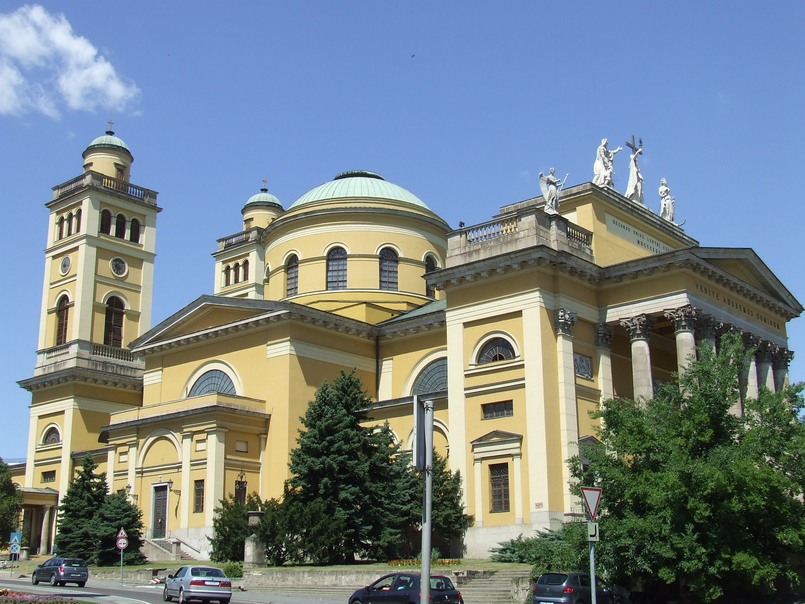 Székesegyház (Szent János apostol és főangyal, Szent Mihály főangyal) (Eger, Eszterházy Károly tér 3.) This is a photo of a monument in Hungary. Identifier: 5554